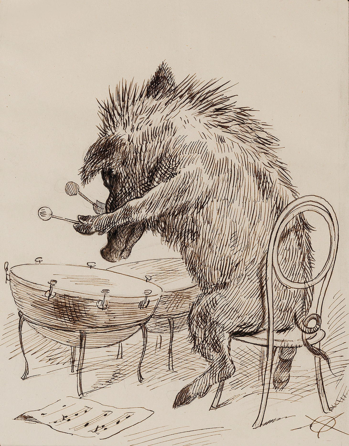 Adolf Oberländer: Die Wildsau Feder in Tusche auf Papier 16 x 12,5 cm Rechts unten monogrammiert